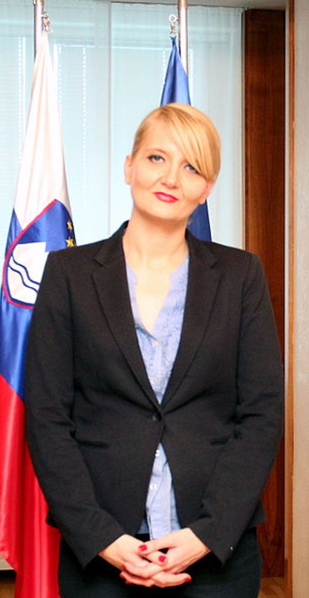 Vesna Györkös Žnidar na delovnem sestanku o zagotavljanju nadaljnje helikopterske nujne medicinske pomoči.